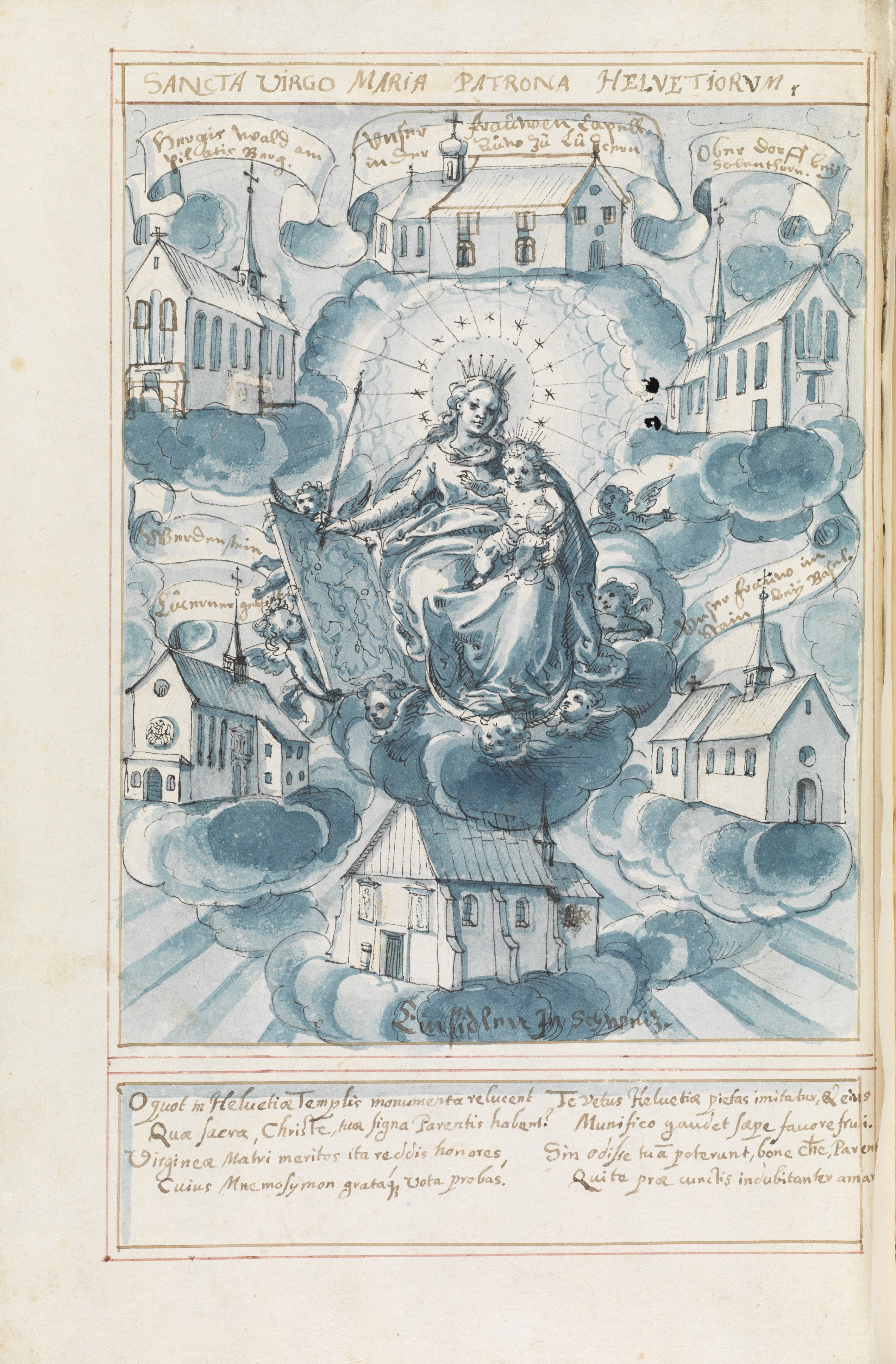 Vorzeichnung von Hans Asper d. J. In: Heinrich Murer: Helvetia Sancta. Paradisus beatorum Helvetiae florum: Das ist ein heiliger lustiger blumen gartten, deren fürnemste blumen so von anfang der christenheit bis auf unsere zeit in heiligkeit des lebens und mancherley wunder wercken in Helvetia gegrünnet. Ittingen, 1638. Frauenfeld, Kantonsbibliothek Thurgau, Y 111, fol. 7v. (E-Codices)